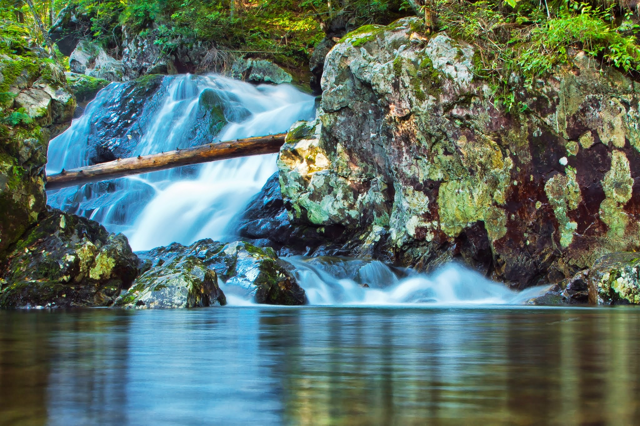 Водопад Медвежий (третий водопад на Смольном ключе)